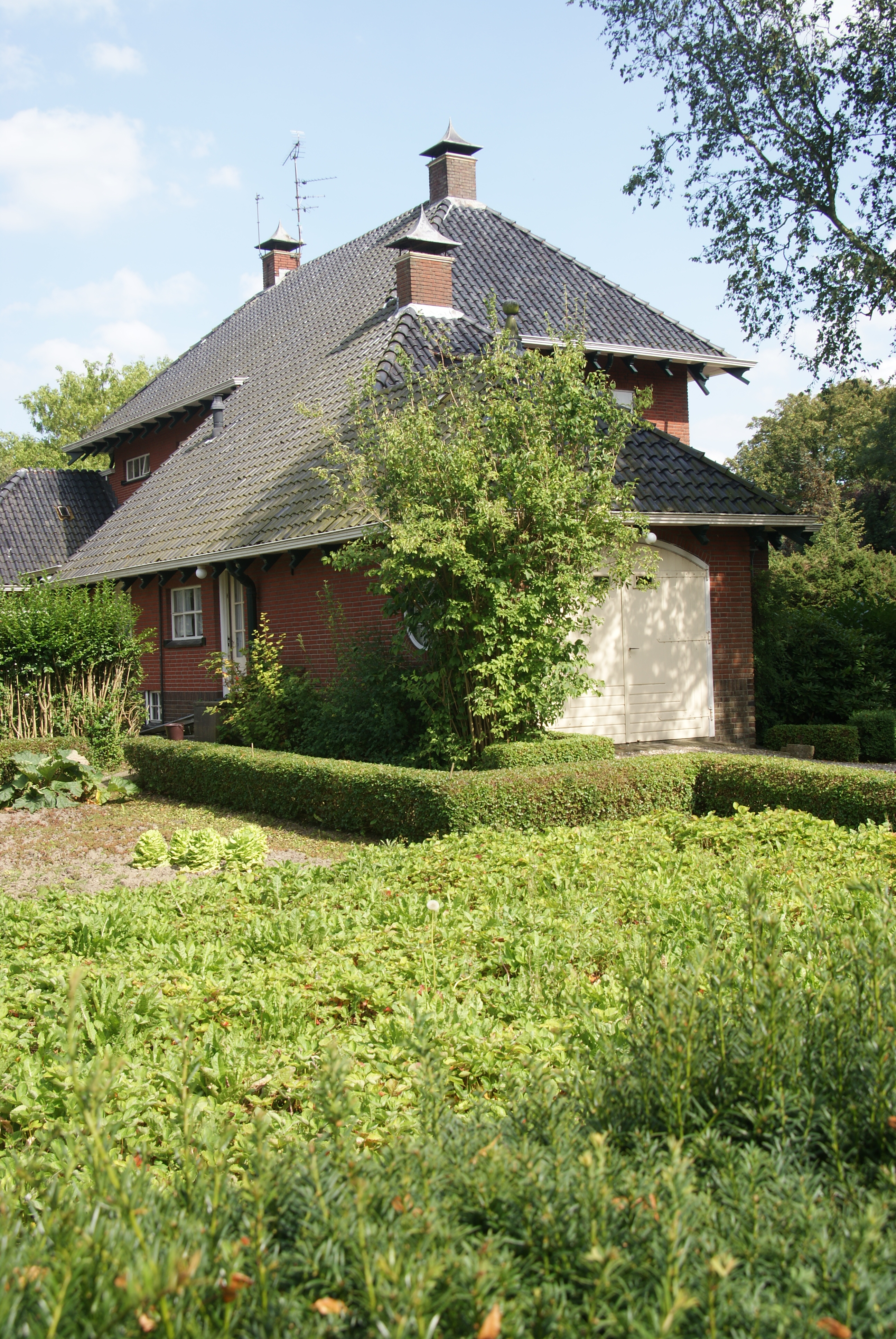 Loppersum. Molenweg 18, rijksmonument 517407